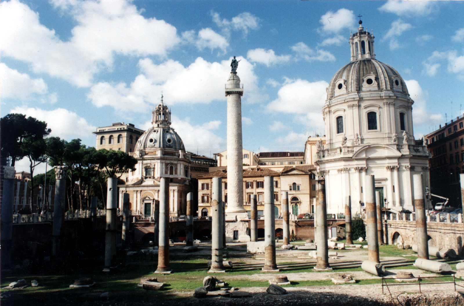 Forum Trajana, Rzym, Roma, Trajan, Traian